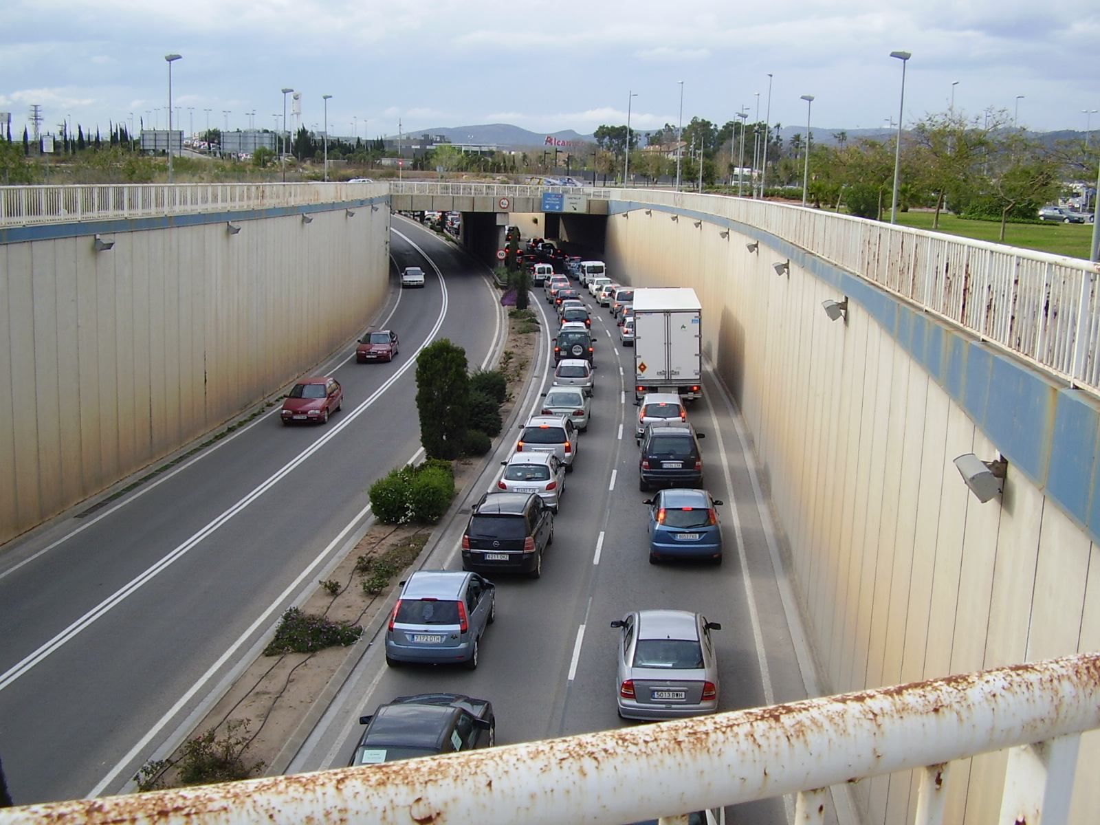 Imagen de las retenciones que diariamente se producen en la Ronda Sur de Castellón